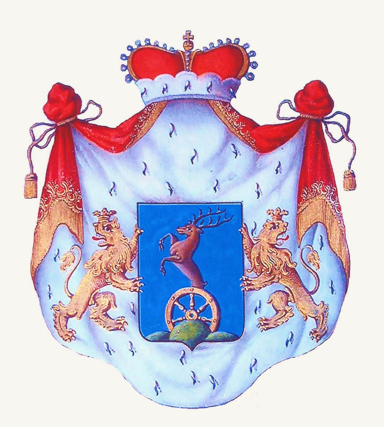 Wappen der Fürsten Pálffy ab Erdőd, Grafik in Fürstenkolorit